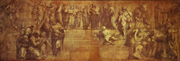 Cartone di raffaello all'ambrosiana